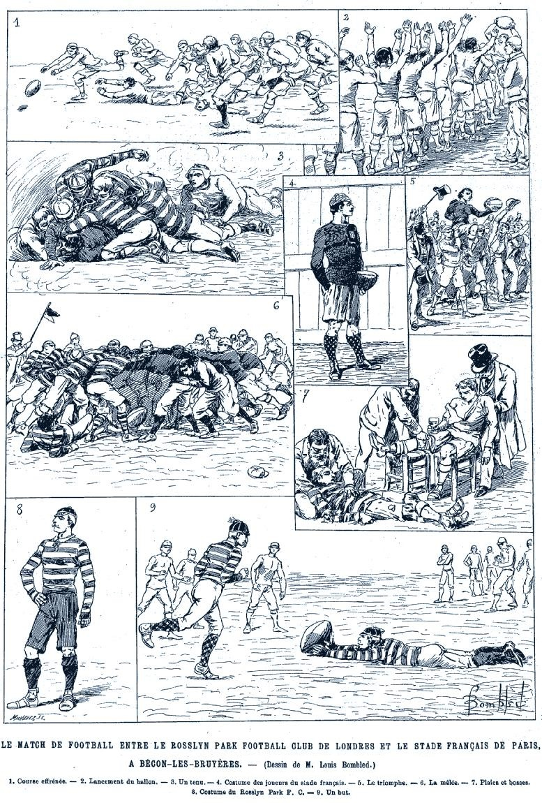 Stade français - Rosslyn Park F.C., 26 mars 1894.